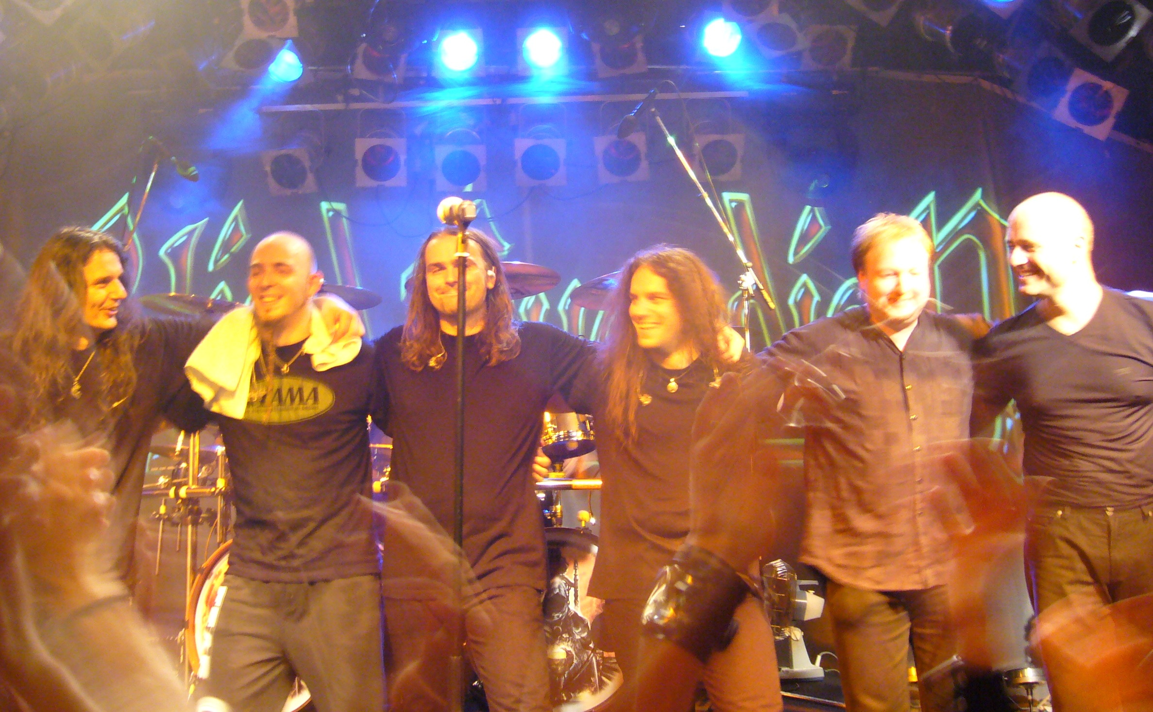 Blind Guardian; Malmo, Skane September 21, 2006. L-R are: André Olbrich (guitar), Frederik Ehmke (drums), Hansi Kürsch (vocals), Marcus Siepen (guitar), Michael Schüren (keyboards), Oliver Holzwarth (bass guitar)